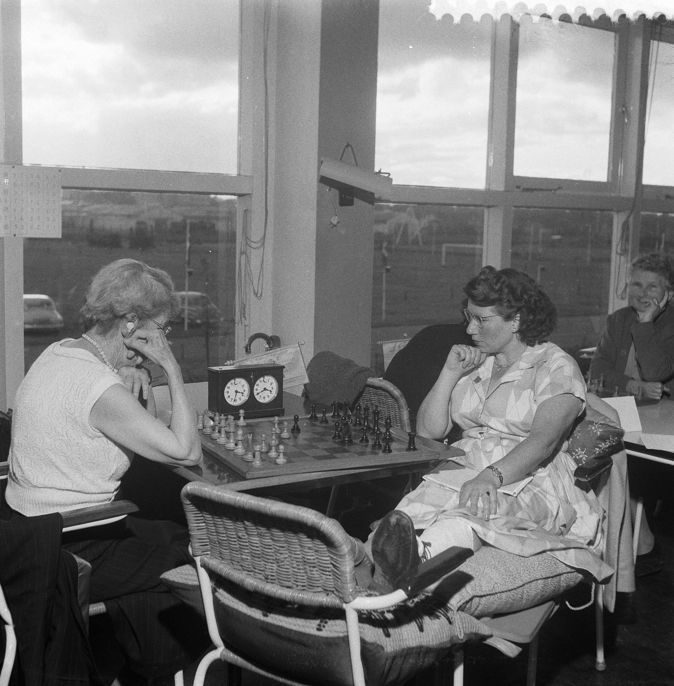 Collectie / Archief : Fotocollectie Anefo Reportage / Serie : [ onbekend ] Beschrijving : Eerste ronde Internationaal Damesschaaktoernooi te Emmen. Fenny Heemskerk (met been in het gips) schaakt tegen de Ierse schaakster mw. Chater. Datum : 3 september 1957 Locatie : Emmen Trefwoorden : Schaken, ronden Fotograaf : Koch, Eric / Anefo Auteursrechthebbende : Nationaal Archief Materiaalsoort : Negatief (zwart/wit) Nummer archiefinventaris : bekijk toegang 2.24.01.03 Bestanddeelnummer : 908-9178